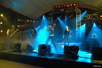 Garden Gang im Münchner Olympiapark - Theatron - August 2008